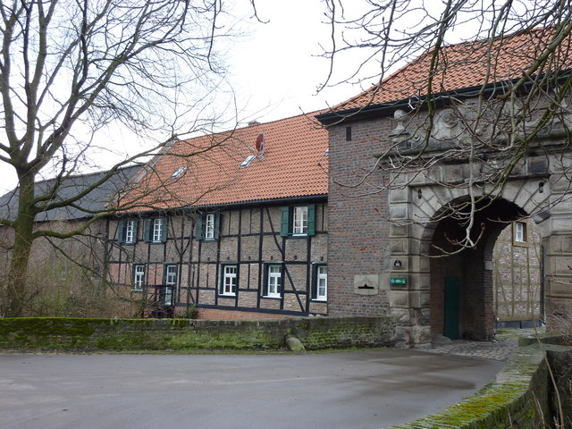 Duisburg-Rahm. Großwinkelhausen.